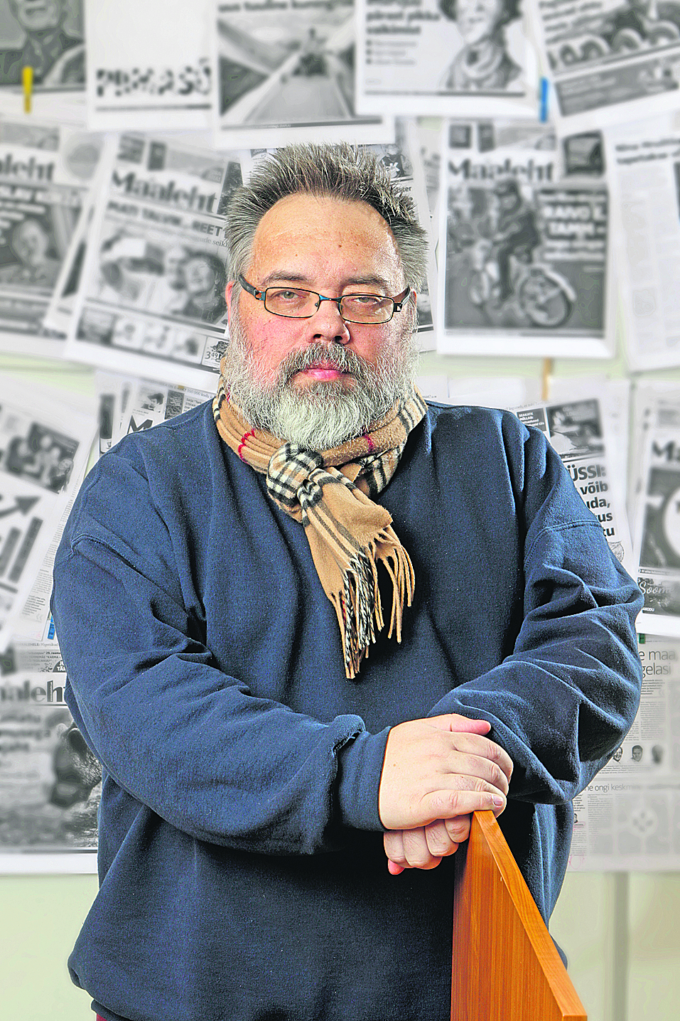 Argo Ideon